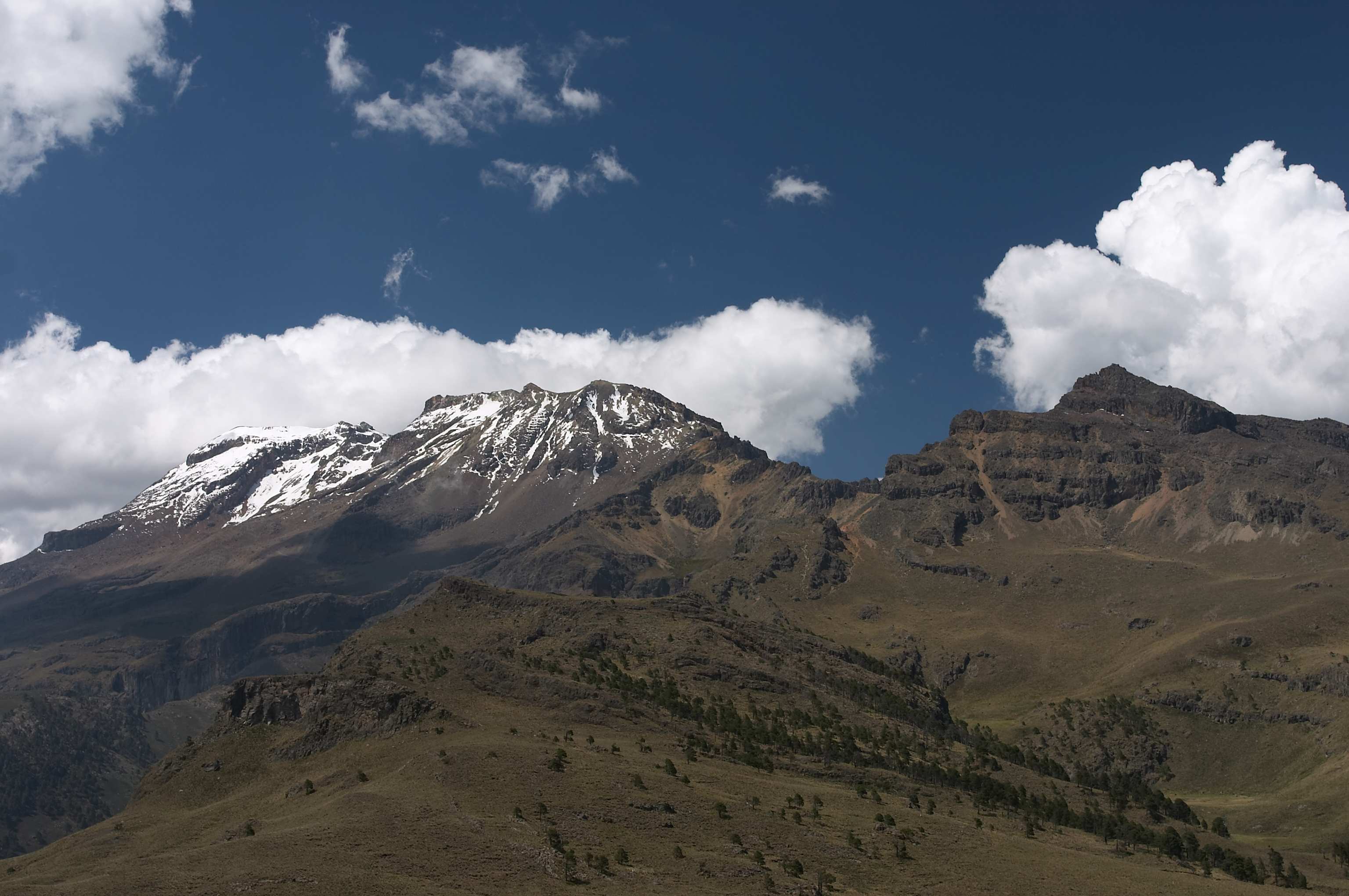 Mexico Iztaccíhuatl mountain